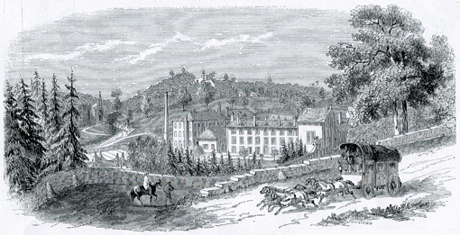 Un dessin montrant la papeterie Blanchet Frères et Kléber au 19eme siècle